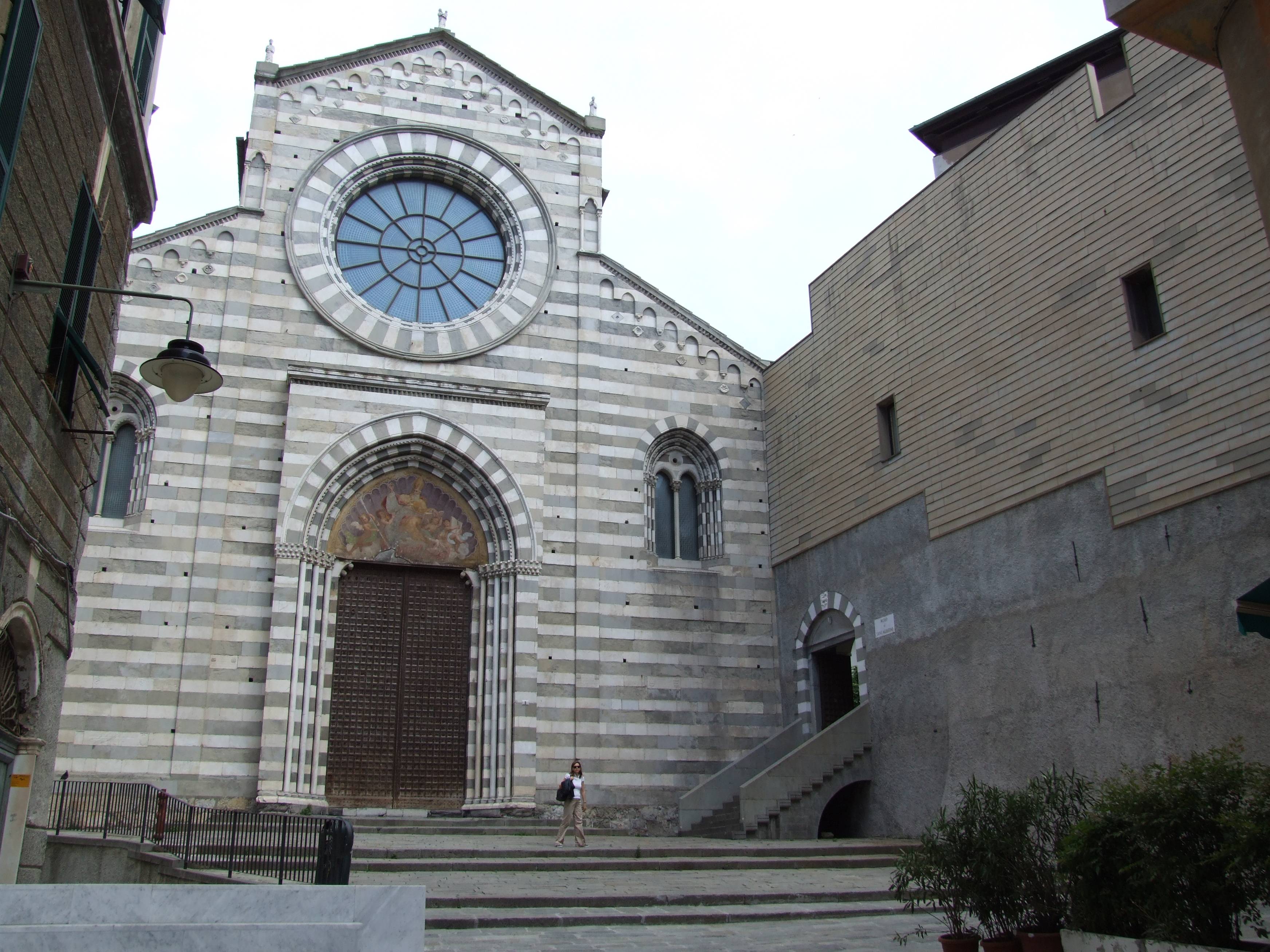 Genoa